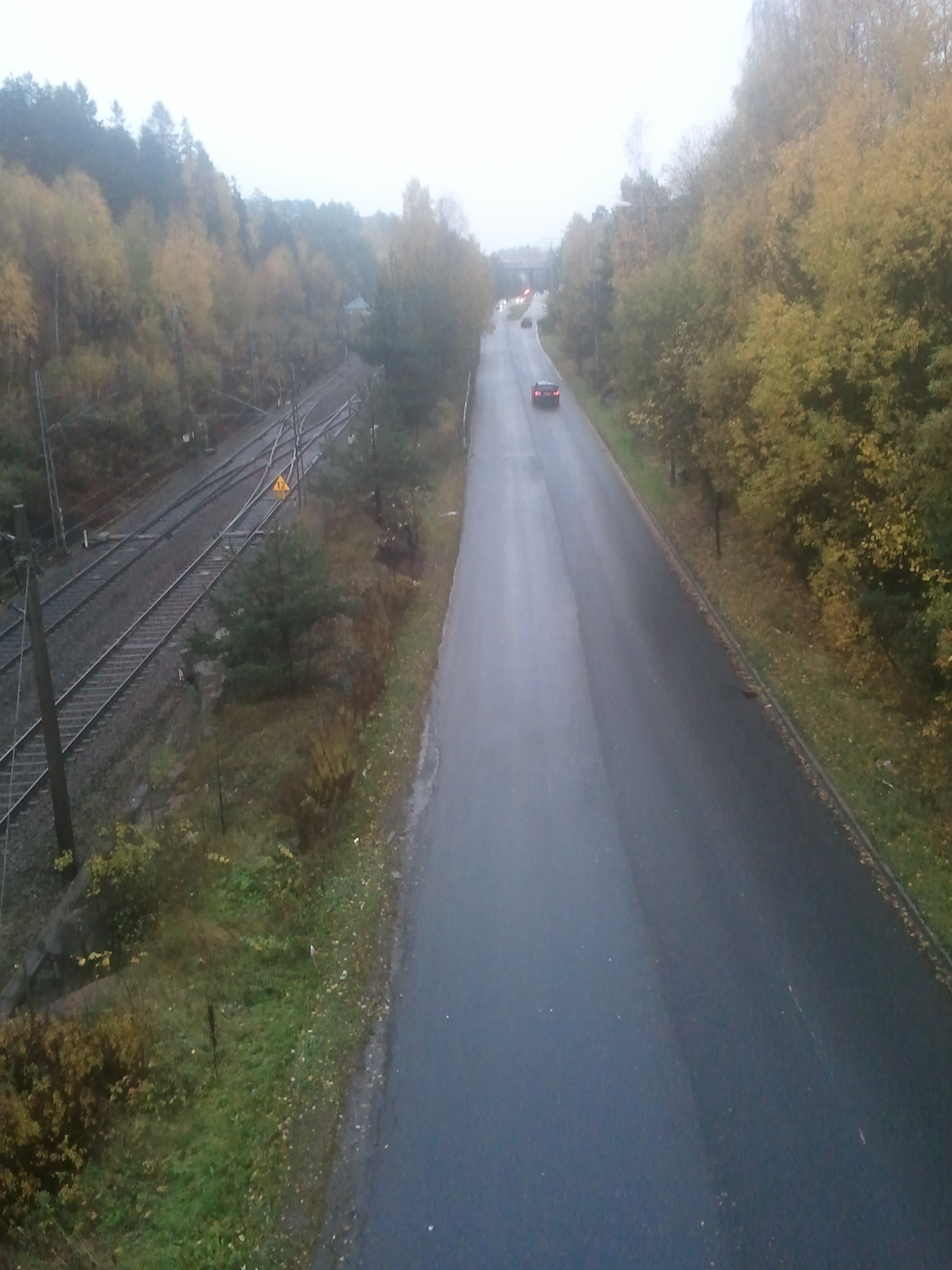 Holmliaveien langs Østfoldbanen nord for Holmlia stasjon, sett sørover.